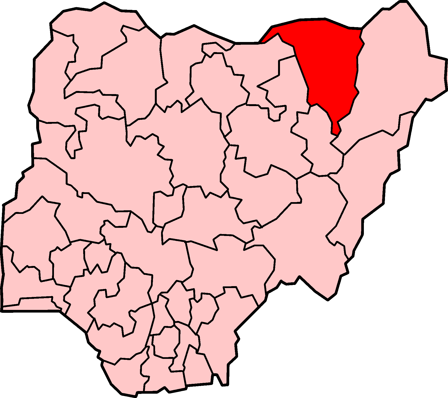 Localização do estado de Yobe na Nigéria.